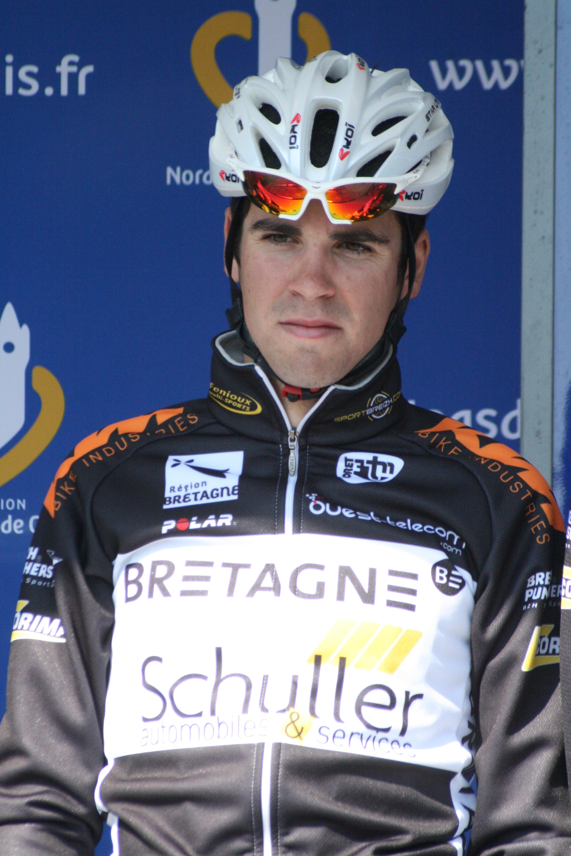 Présentation des coureurs au départ de la première étape Johan Le Bon